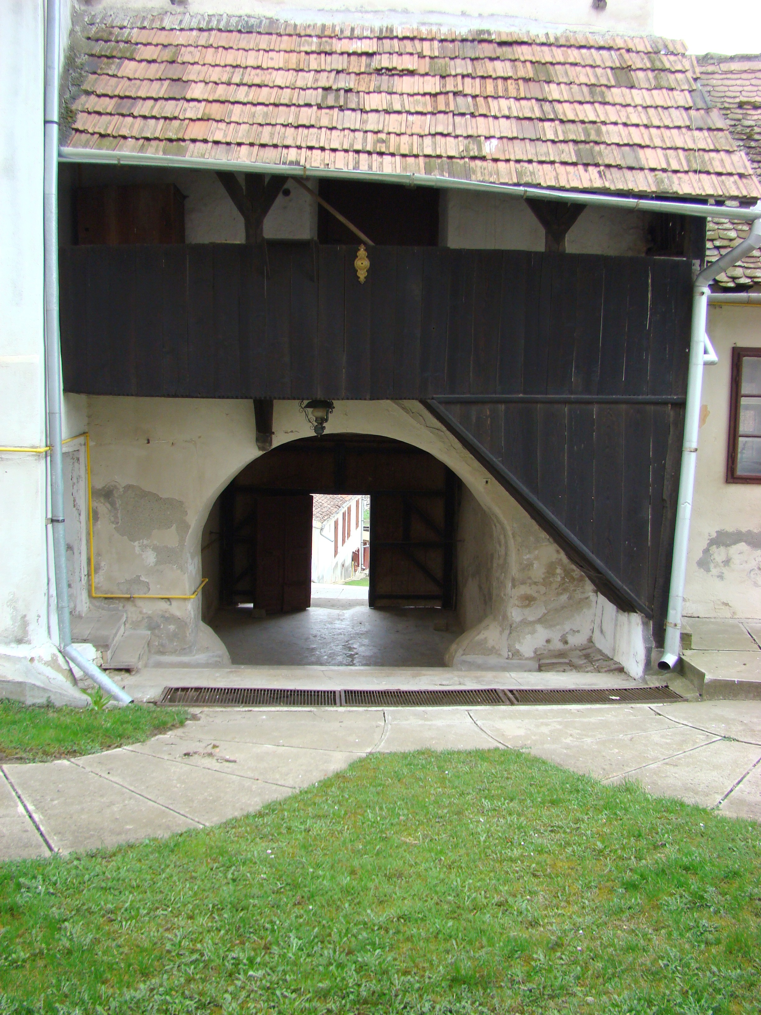 Biserica evanghelică fortificată, sat BAZNA; comuna BAZNA, județul Sibiu 02